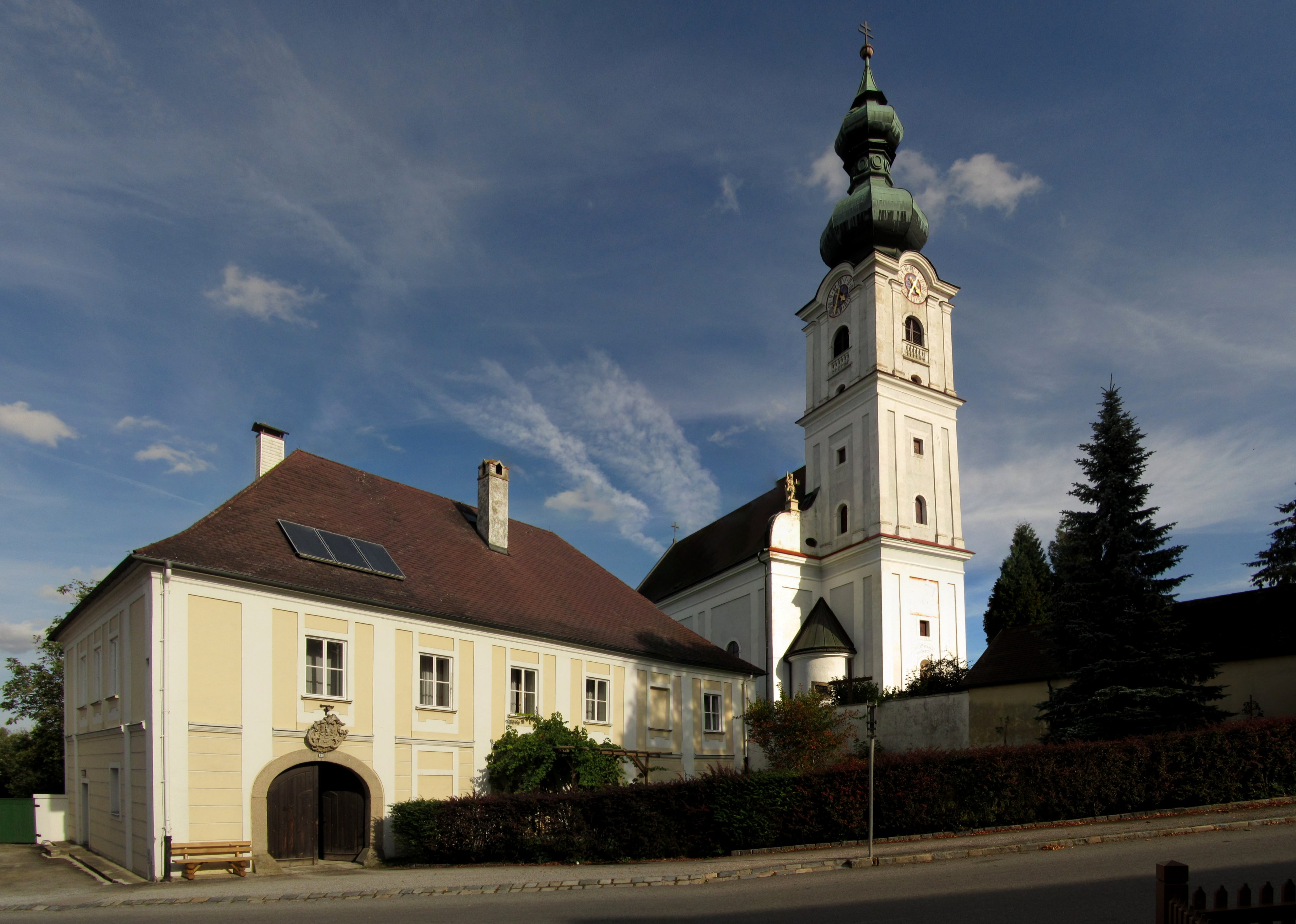 Pfarrhof